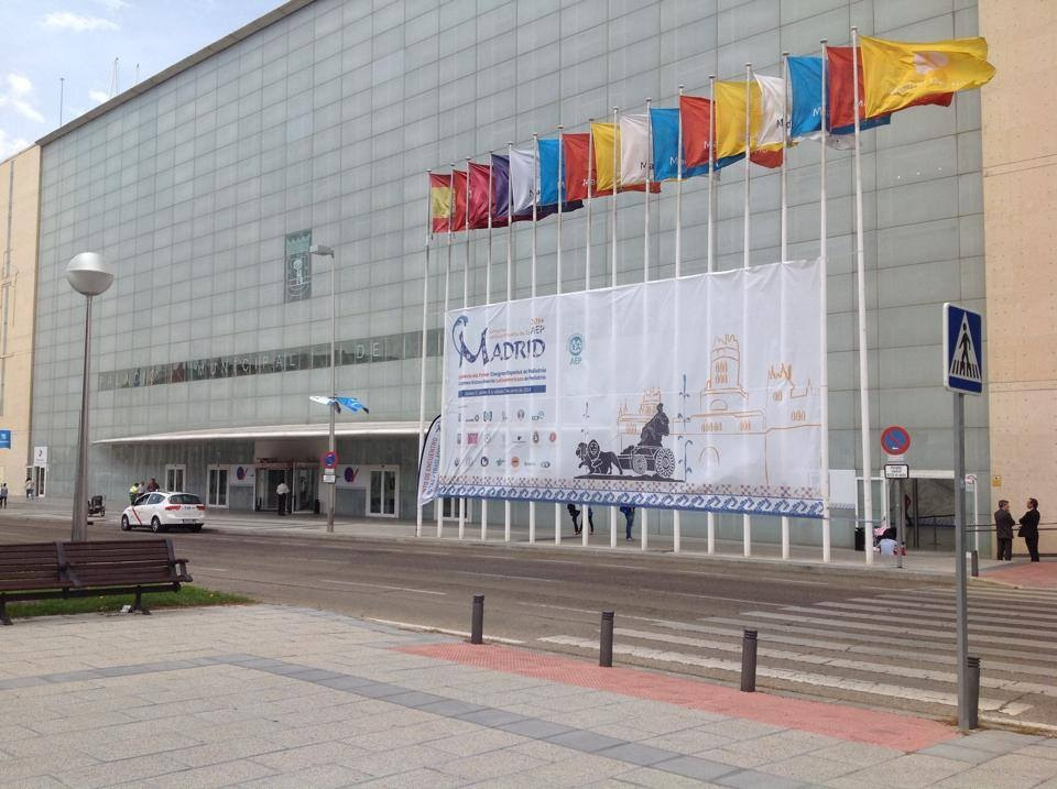 Congreso extraordinario Asociación Española de Pediatría 2014 en Madrid conmemorando los 100 años desde el primer congreso pediátrico en España